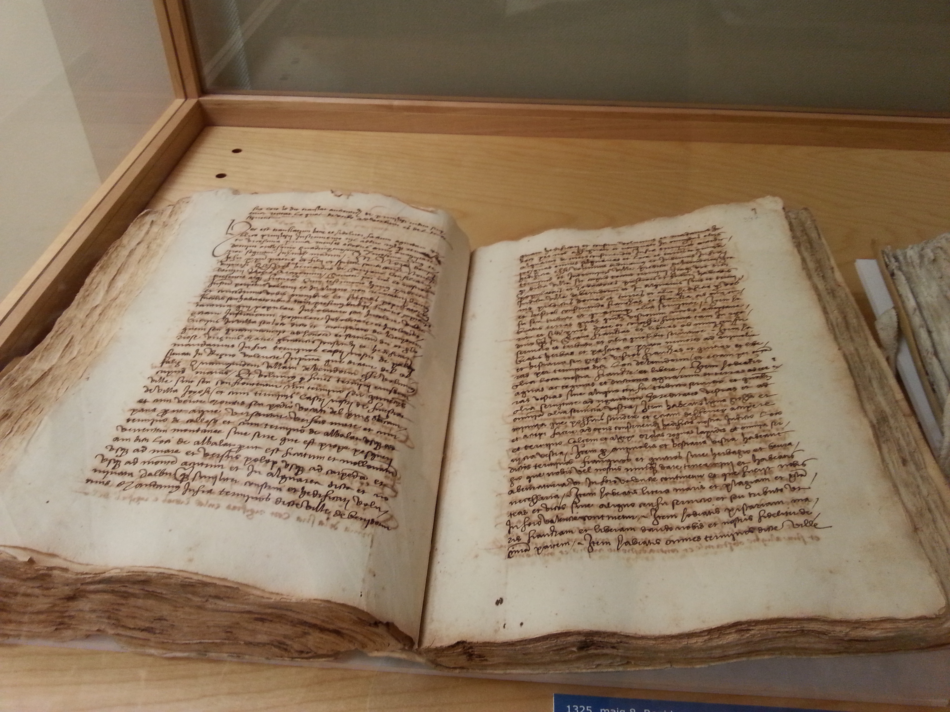 En Bernat de Sarrià, almirall d'Aragó, atorga carta pobla per a diversos repobladors cristians a la vila de Benidorm, a fur de València (8 de maig de 1325). Arxiu del Regne de València. ARVː Governació, núm. 2740, mà 2, fol. 25, i mà 8, fol. 1 (còpia de 21 d'octubre de 1435).